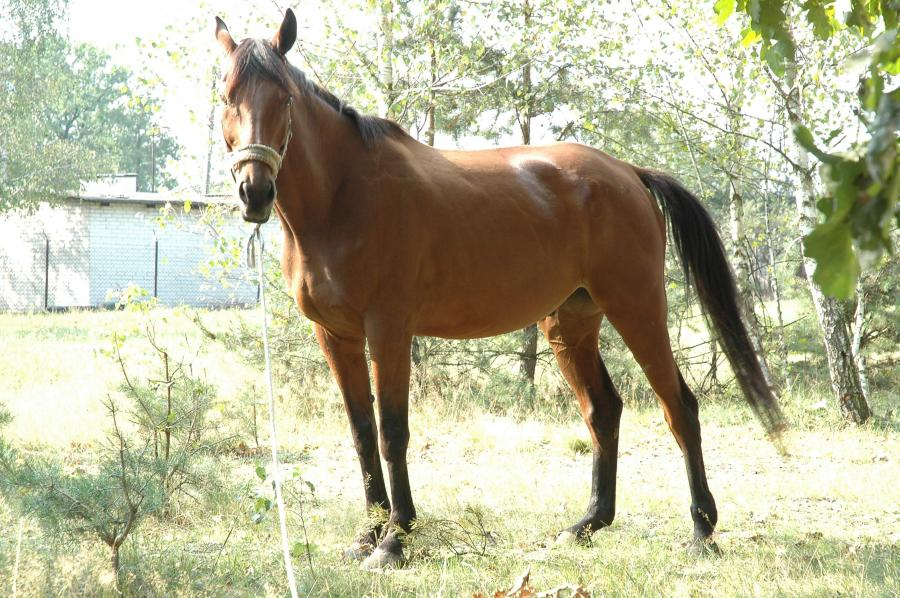 Cedr, koń rasy wielkopolskiej, używany paradnie i bojowo w szeregach chorągwi hetmana Żółkiewskiego